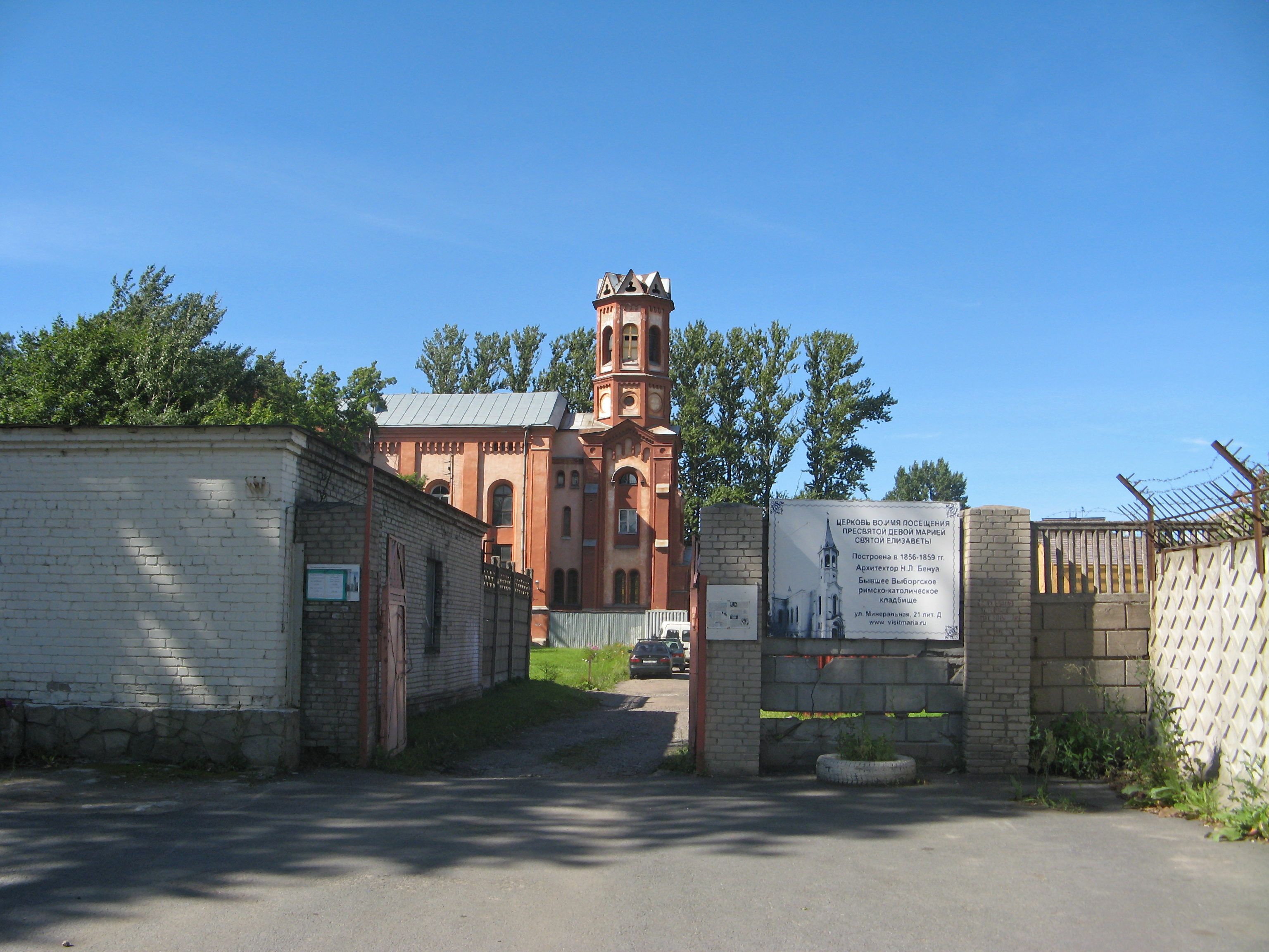 Выборгское римско-католическое кладбище: Минеральная улица, 23, Калининский район, Санкт-Петербург